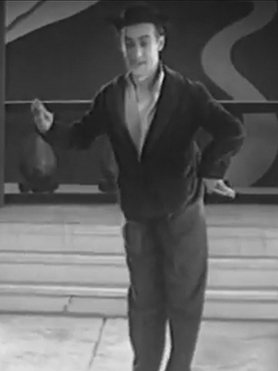 Totò nel suo primo provino cinematografico